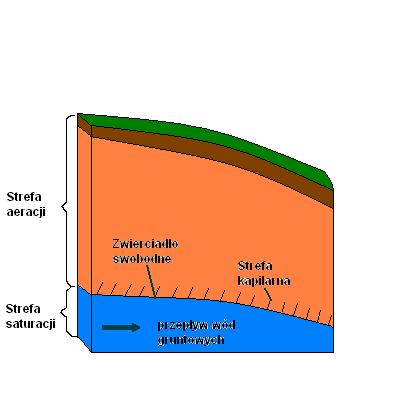 Przekrój wzgórza obrazujący strefy aeracji, saturacji i kapilarną.